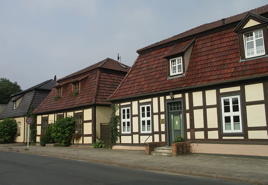 Boizenburg